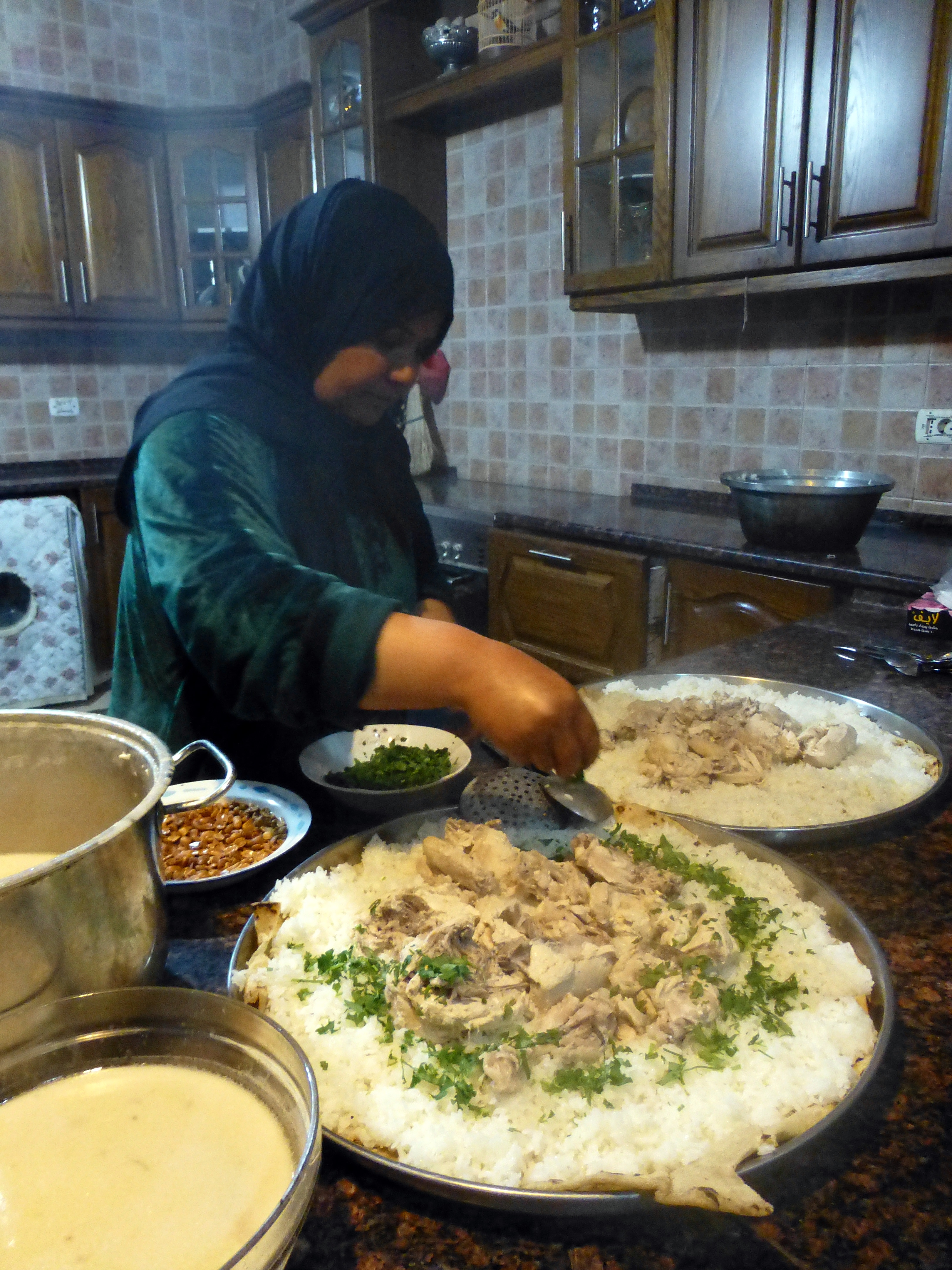 Préparation du mansaf dans la région de Pétra (Jordanie). Le plus souvent à base d'agneau, il est ici préparé avec du poulet.